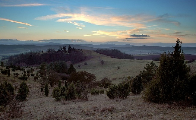 Wacholderheide im Werratal (Germany)